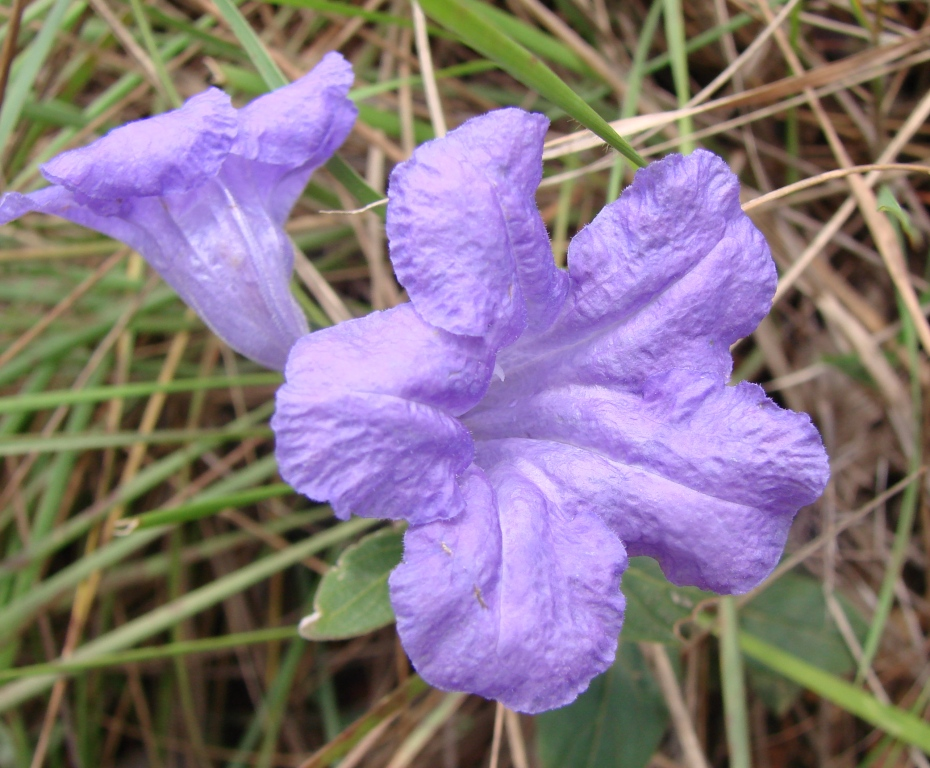 Ruellia geminiflora - ACANTHACEAE Chapada Imperial - Brasília - Distrito Federal - Brasil.